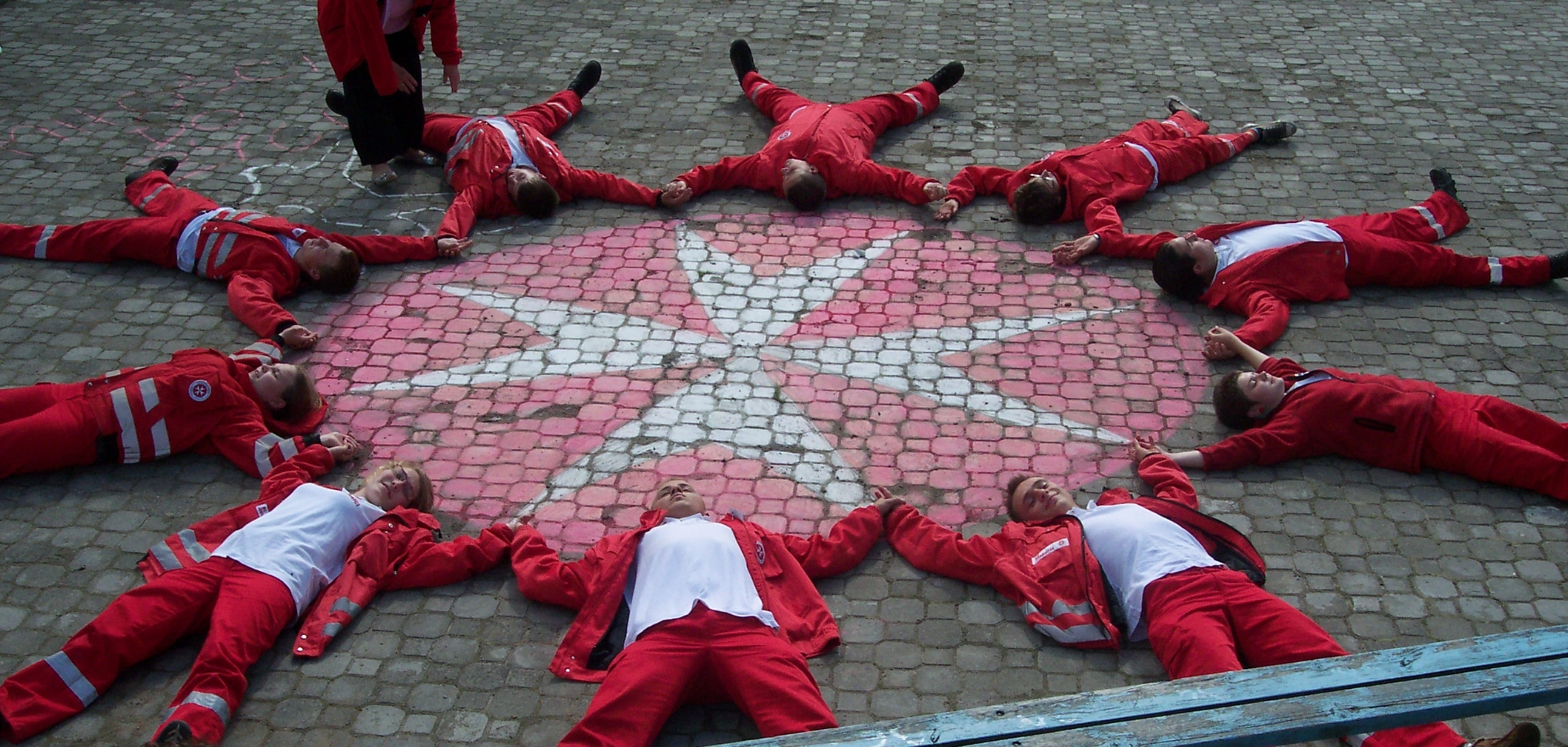 Wolontariusze JDP (oddział Lidzbark Warm.) wokół loga JDP